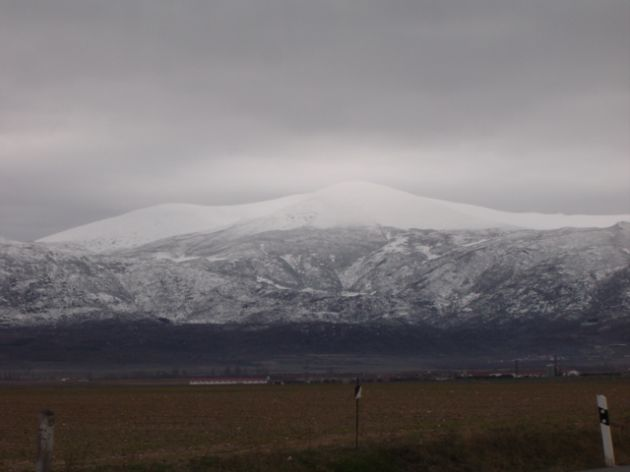 La Serrota 2294 m. (Ávila), España